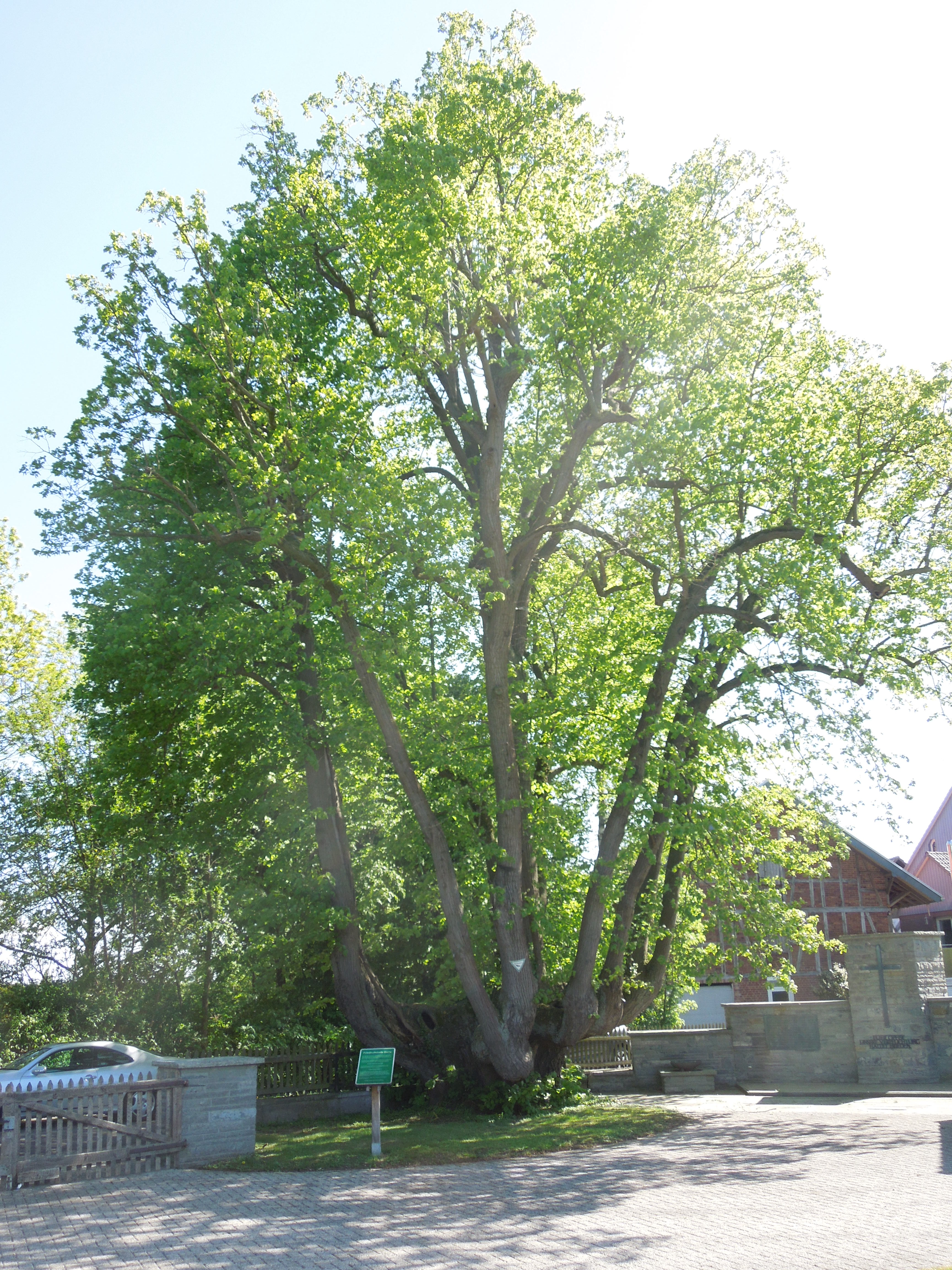 Die mehr als 500 Jahre alte Kandelaberlinde auf dem Friedhof im Gudensberger Stadtteil Dorla (Mai 2015, vor ihrer Radikalstutzung im Juli 2015